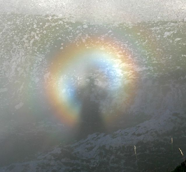 Spectre de Brocken